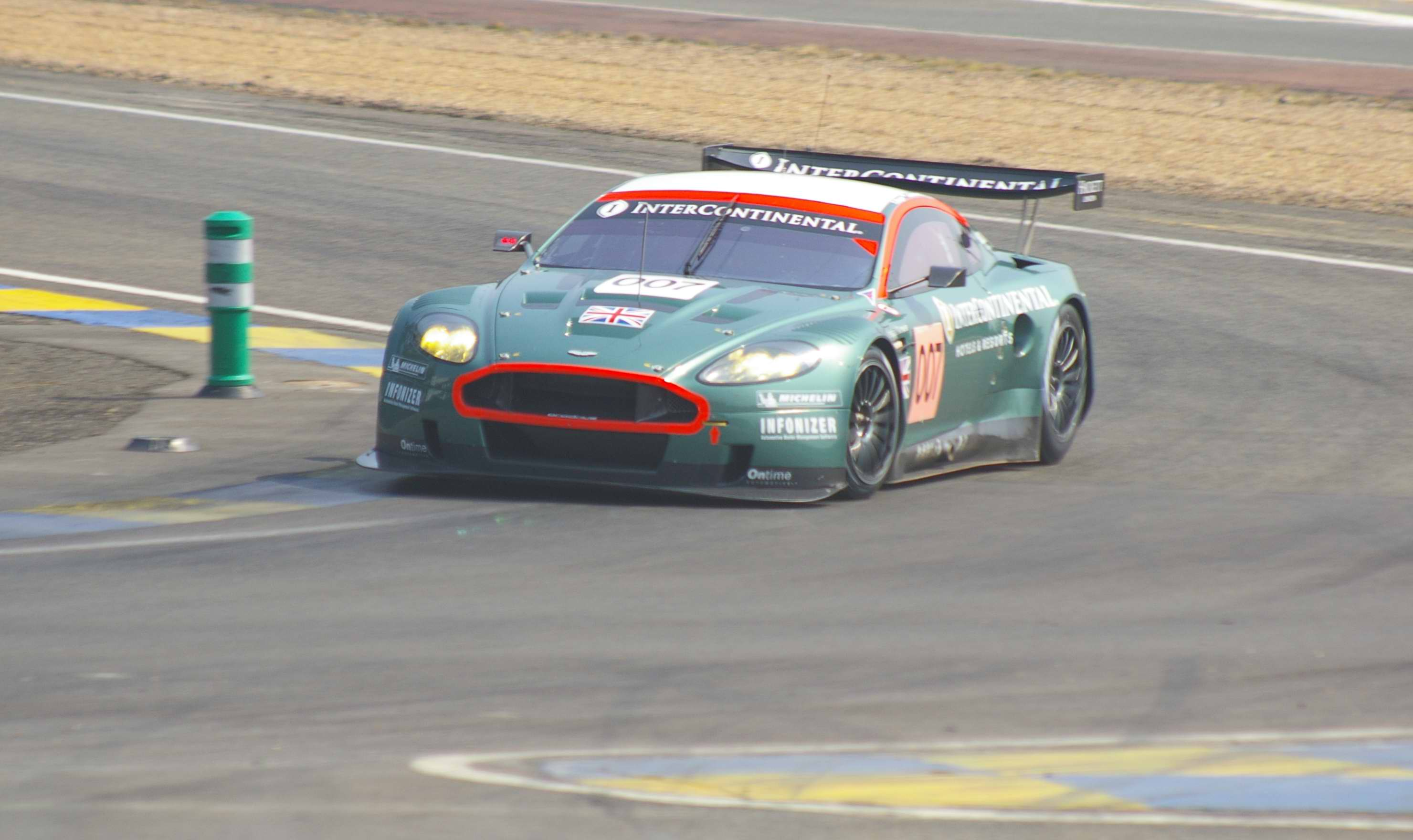 Virage de Mulsanne - Aston Martin DBR9 de l'équipage 007 (Tomas Enge, Johnny Herbert et Peter Kox) lors de la journée test des 24h du Mans du 03 juin 2007.